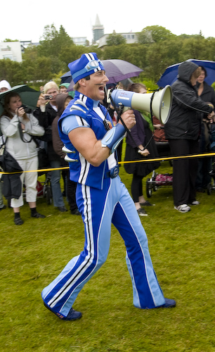 Latabæjarhlaup - íþróttaálfurinn